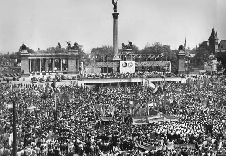 Budapest, II. Weltfestspiele, Festumzug, Heldenplatz Weltjugendspiele in Budapest beendet-Am 28.August 1949 verabschiedeten sich die ausländischen Delegierten der Weltjugendspiele von Budapest und seiner gastfreundlichen Bevölkerung.Eine große Schlußdemonstration, an der sich alle Delegierten beteiligten, bildeten den Abschluß der Festspiele.In endlos scheinenden Zügen zogen die Delegierten der einzelnen Nationen durch die Straßen der ungarischen Hauptstadt zum Heldenplatz, wo der stellv.Ministerpräsident Matyas Rakosi eine Ansprache hielt.Die Vertreter der Weltjugend gelobten dort, daß sie ihren Kampf für den Frieden bis zum Sieg fortsetzen werden UBz:Der Heldenplatz, wo die Jugend von 84 Nationen sich gelobte, den Kampf für den Frieden bis zum Sieg fortzusetzen.Foto:Illus